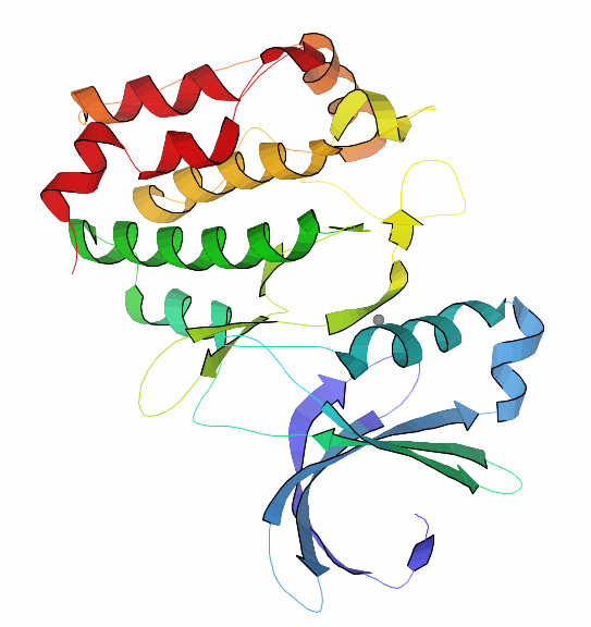 kinase domain of Aurora A kinase